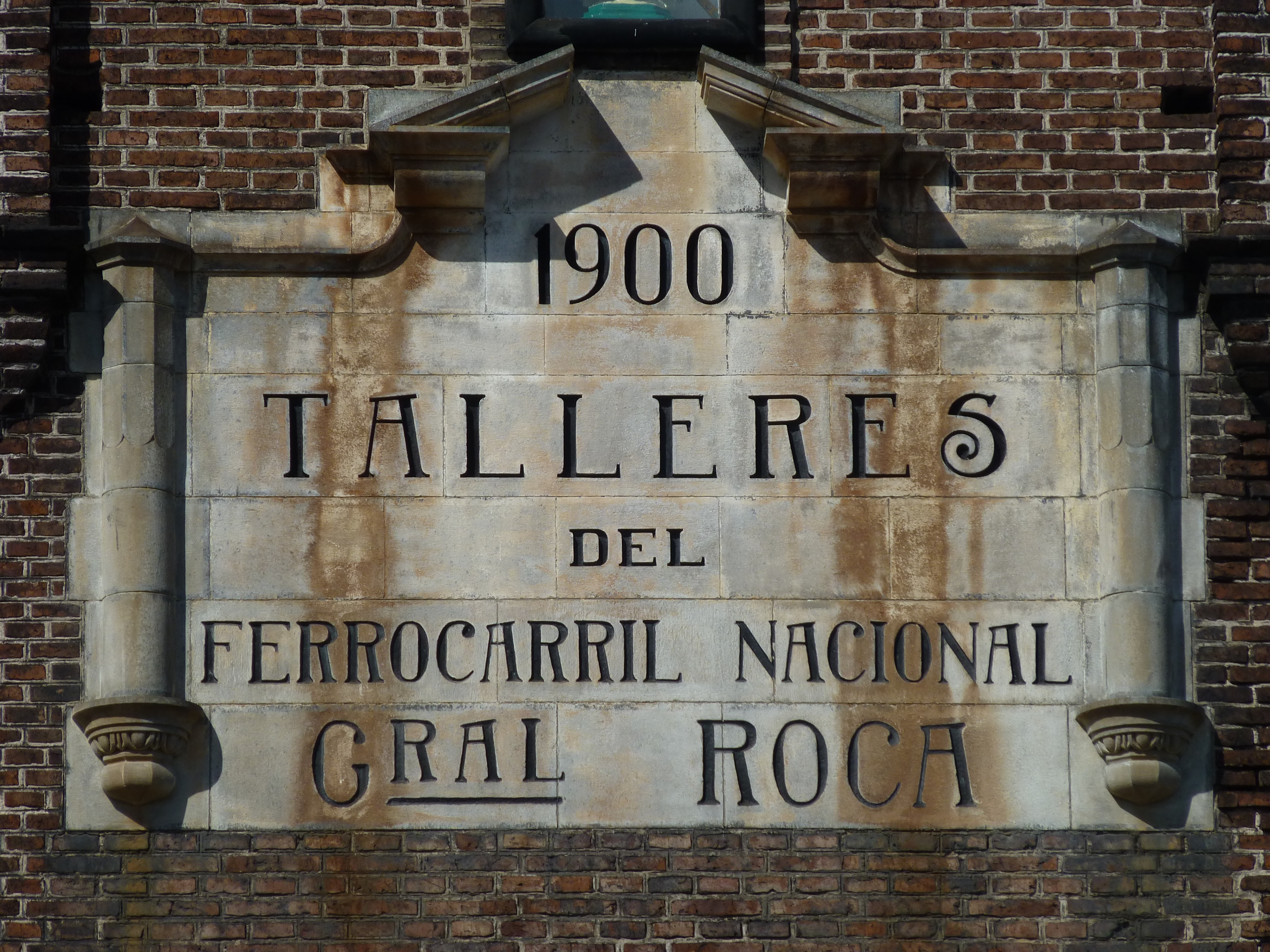 Placa de los Talleres del Ferrocarril Nacional General Roca - Remedios de Escalada, Buenos Aires.